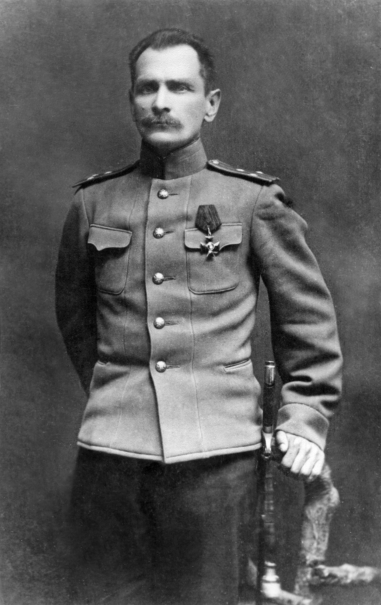 Подполковник Арсеньев со знаком ордена Святого Владимира 4-й степени. Сбоку эфеса шашки виден знак ордена Святой Анны 4-й степени и темляк из орденской ленты. Фотография 1917 г.